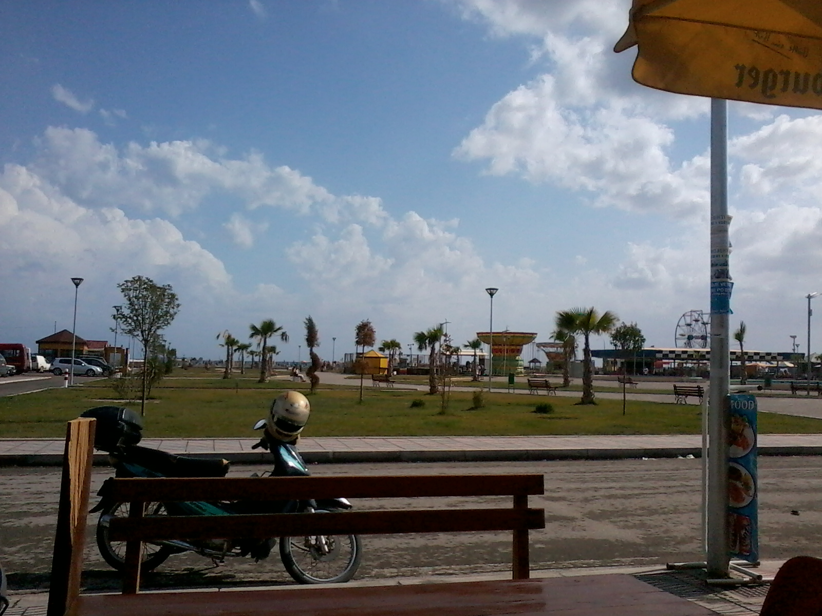 Kune-Vain-Tale, Lezhe